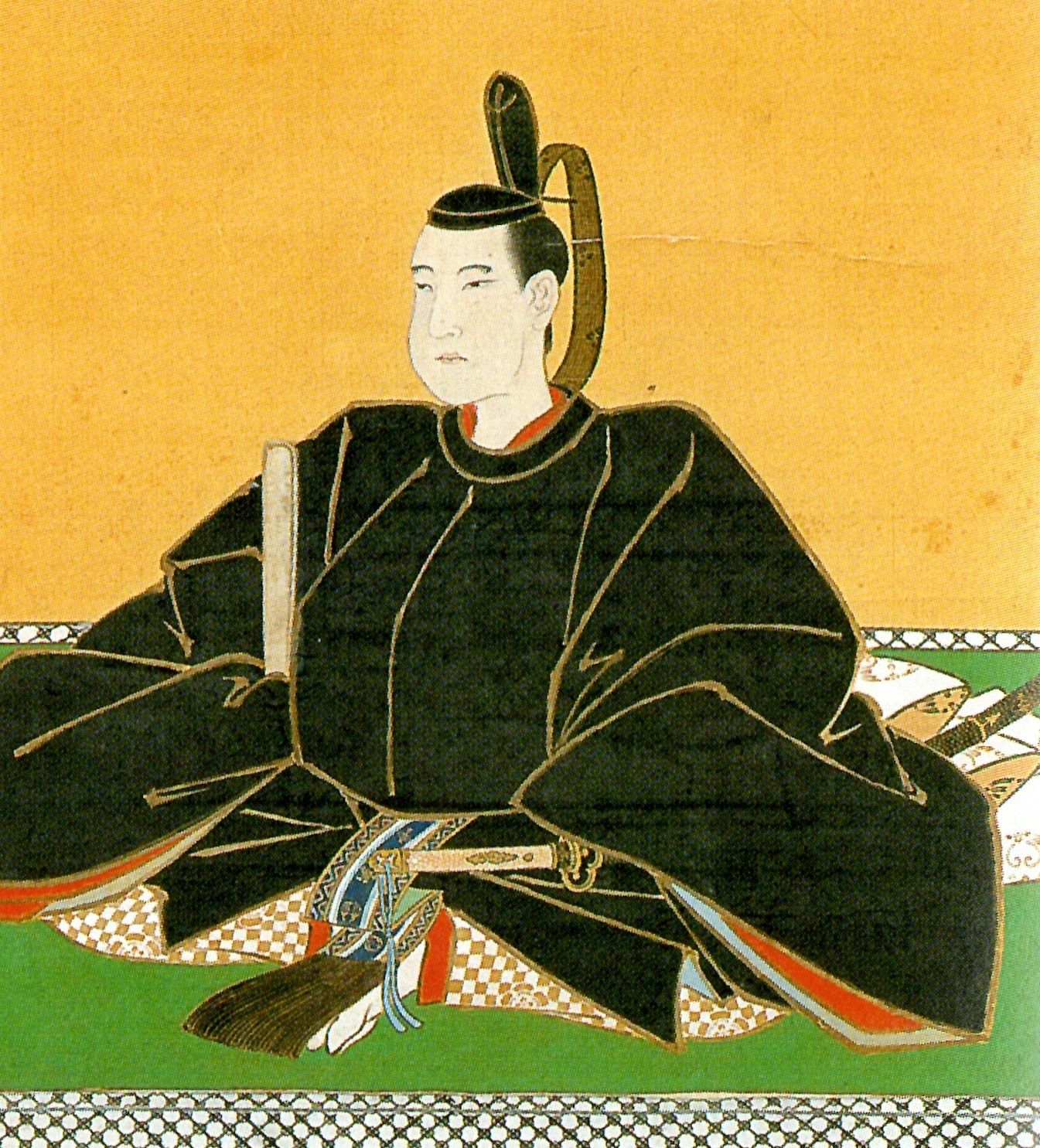 立花鑑備の肖像。